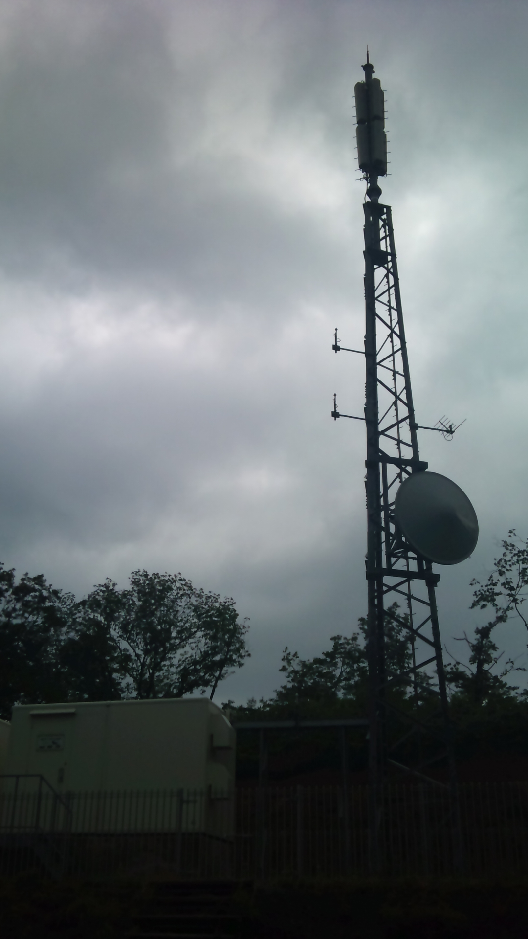 谷地山デジタル中継局